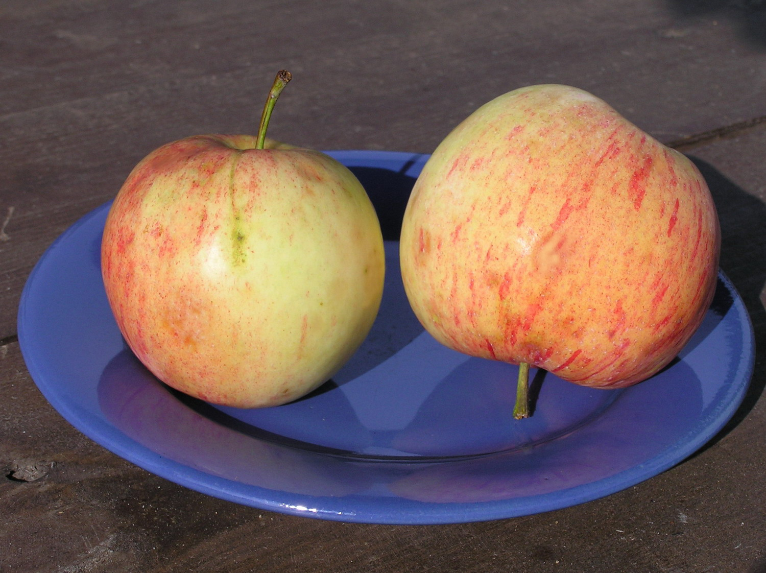 Яблоки сорта 'Боровинка' (автор фото: В.Брыкин)